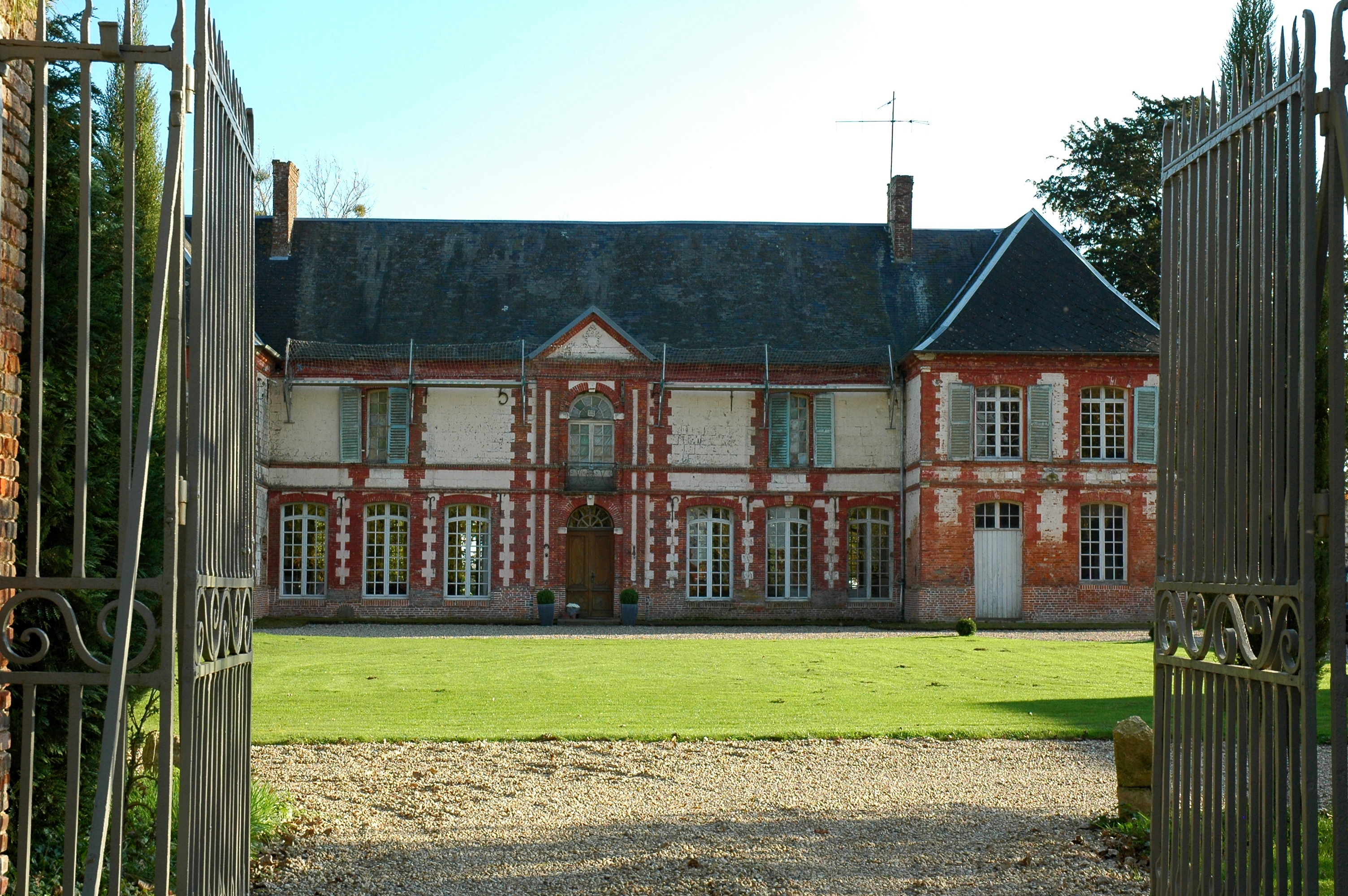 Busménard (Somme, France). Le château.